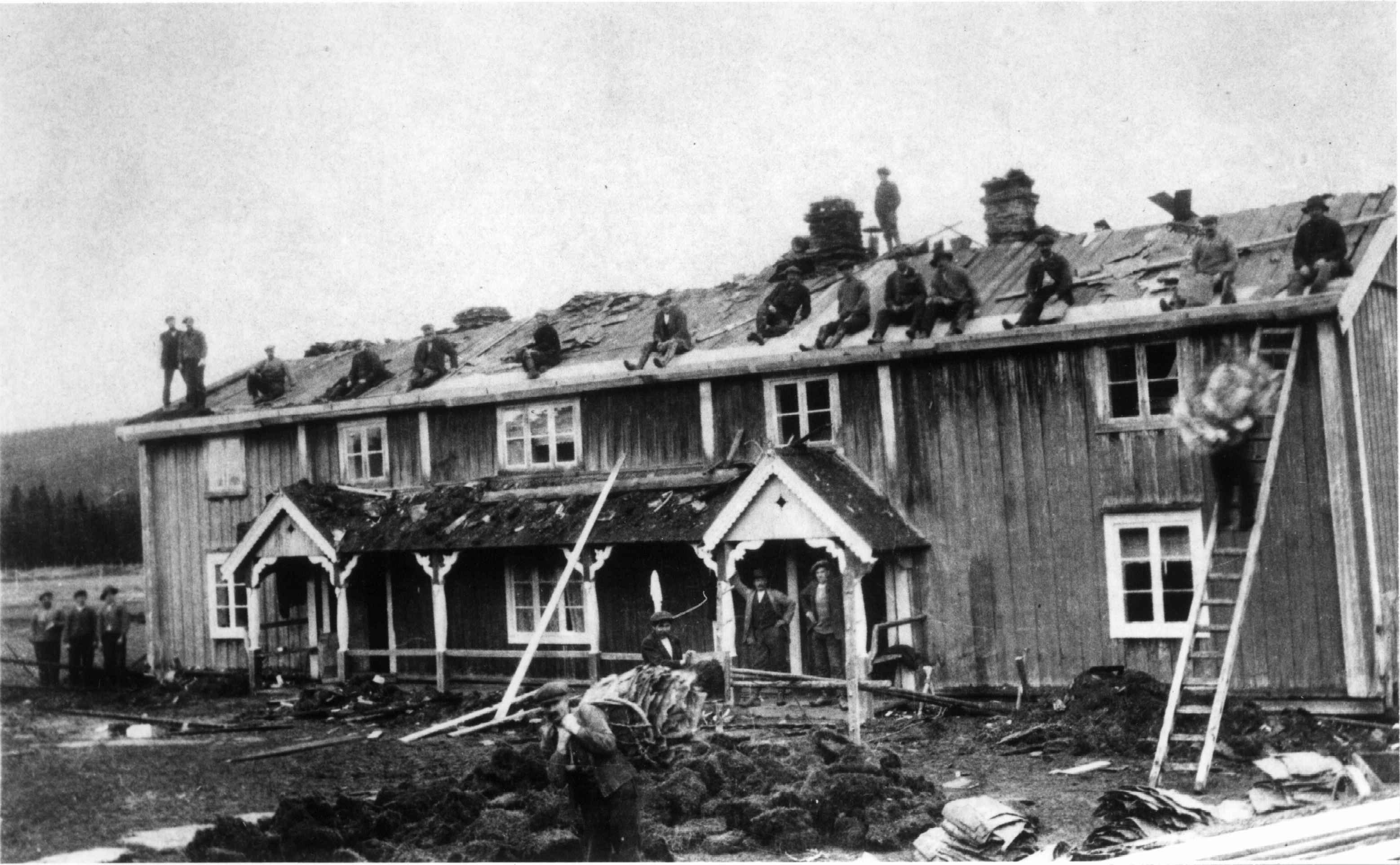 Taktekkerdugnad på Aune i Tydal ca 1915.